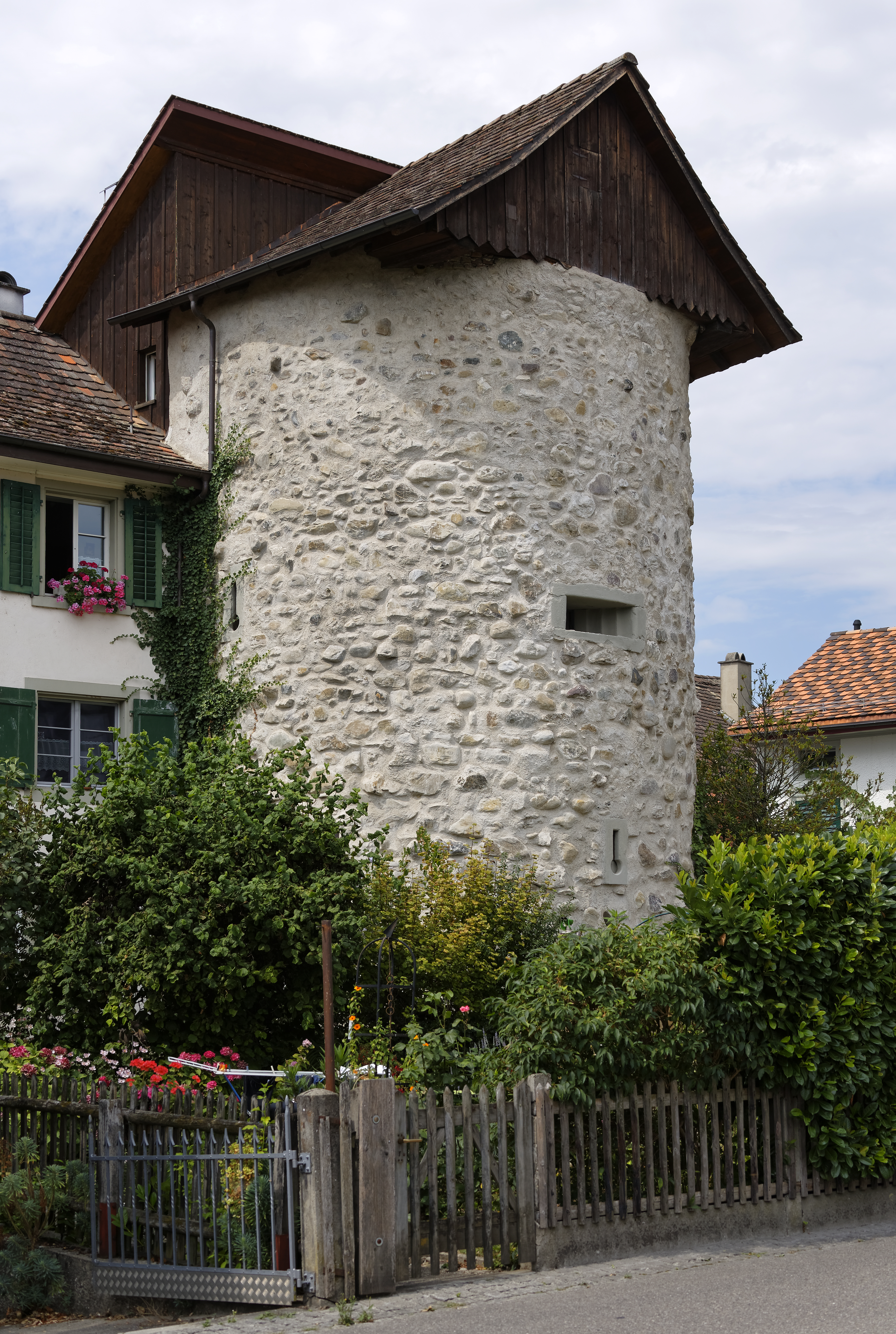 Künstlerresidenz Chretzeturm 2